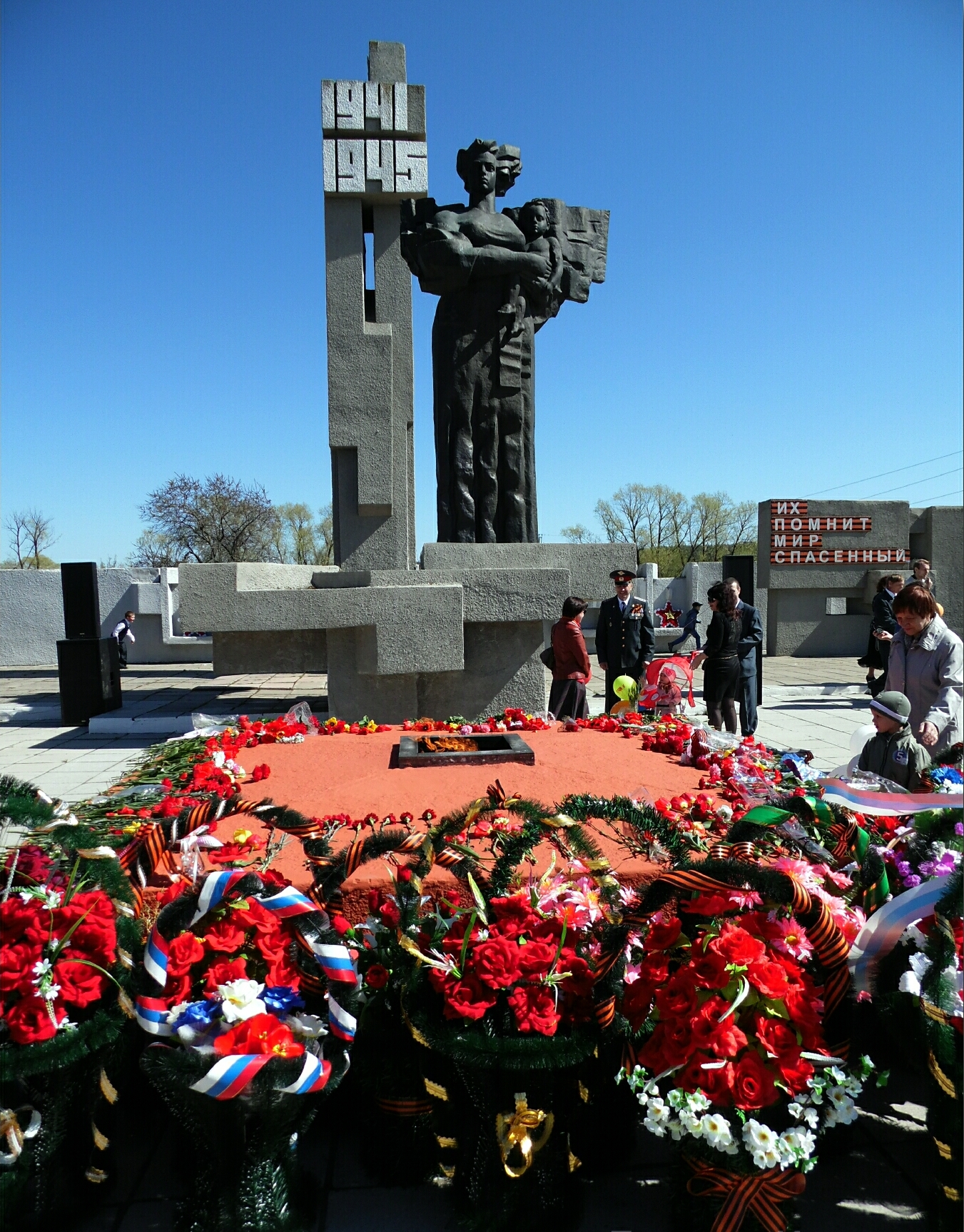 Торжественное открытие мемориала состоялось в 1985 году, когда отмечалось 40-летие Победы в Великой Отечественной войне. Он представляет собой комплекс, состоящий из скульптурного изображения женщины с младенцем на руках, стелы с датами войны и стены с памятными надписями.